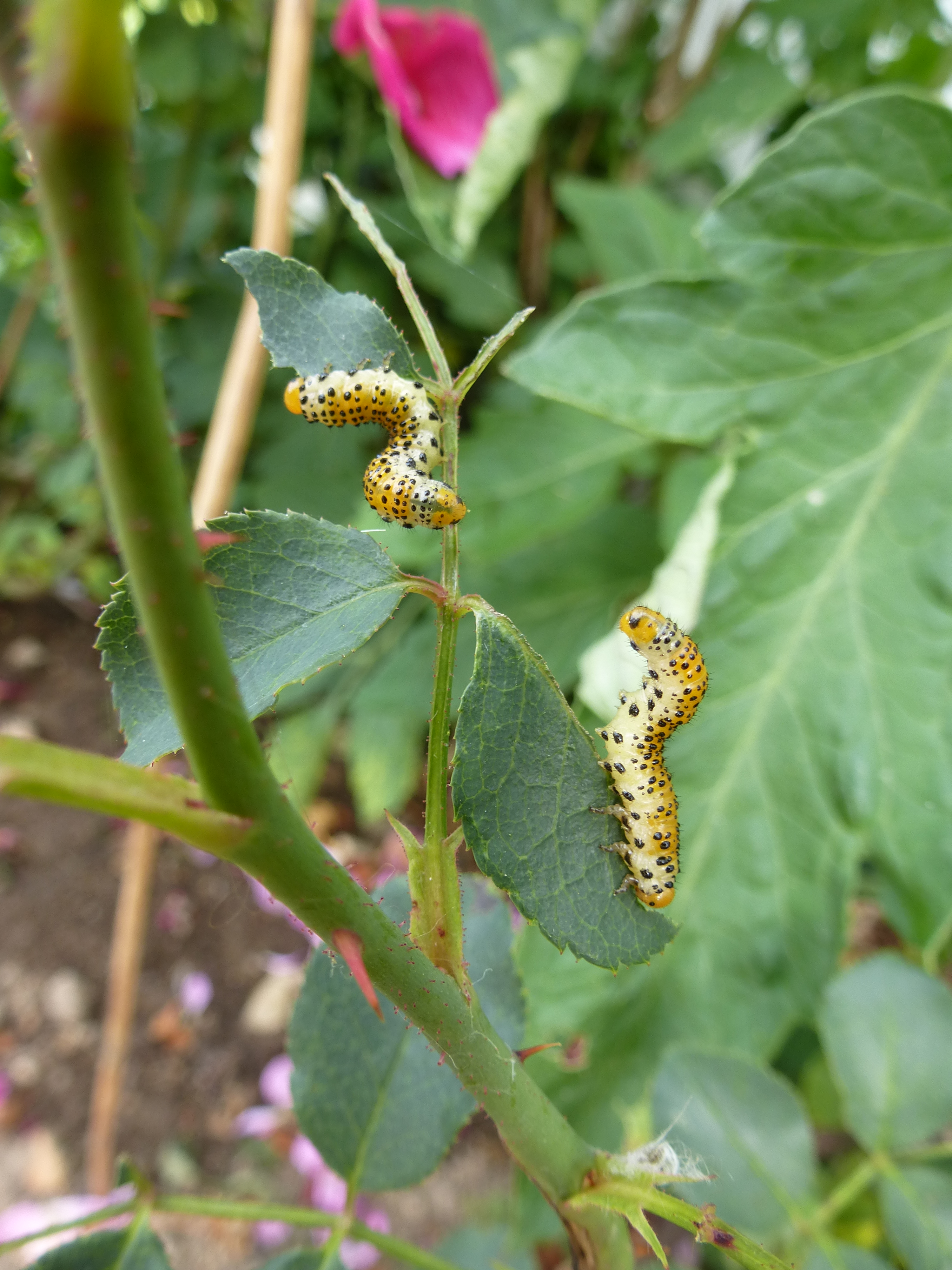 Arge ochropus ou Tenthrède des rosiers